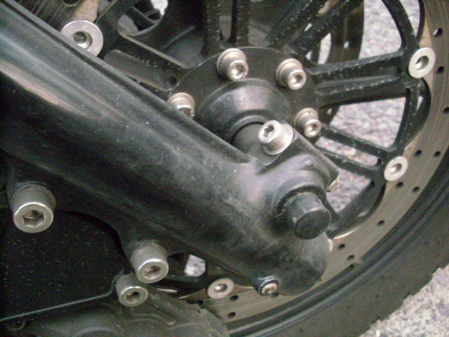 Kawasaki Z1300 アクスルシャフトのボルト1本